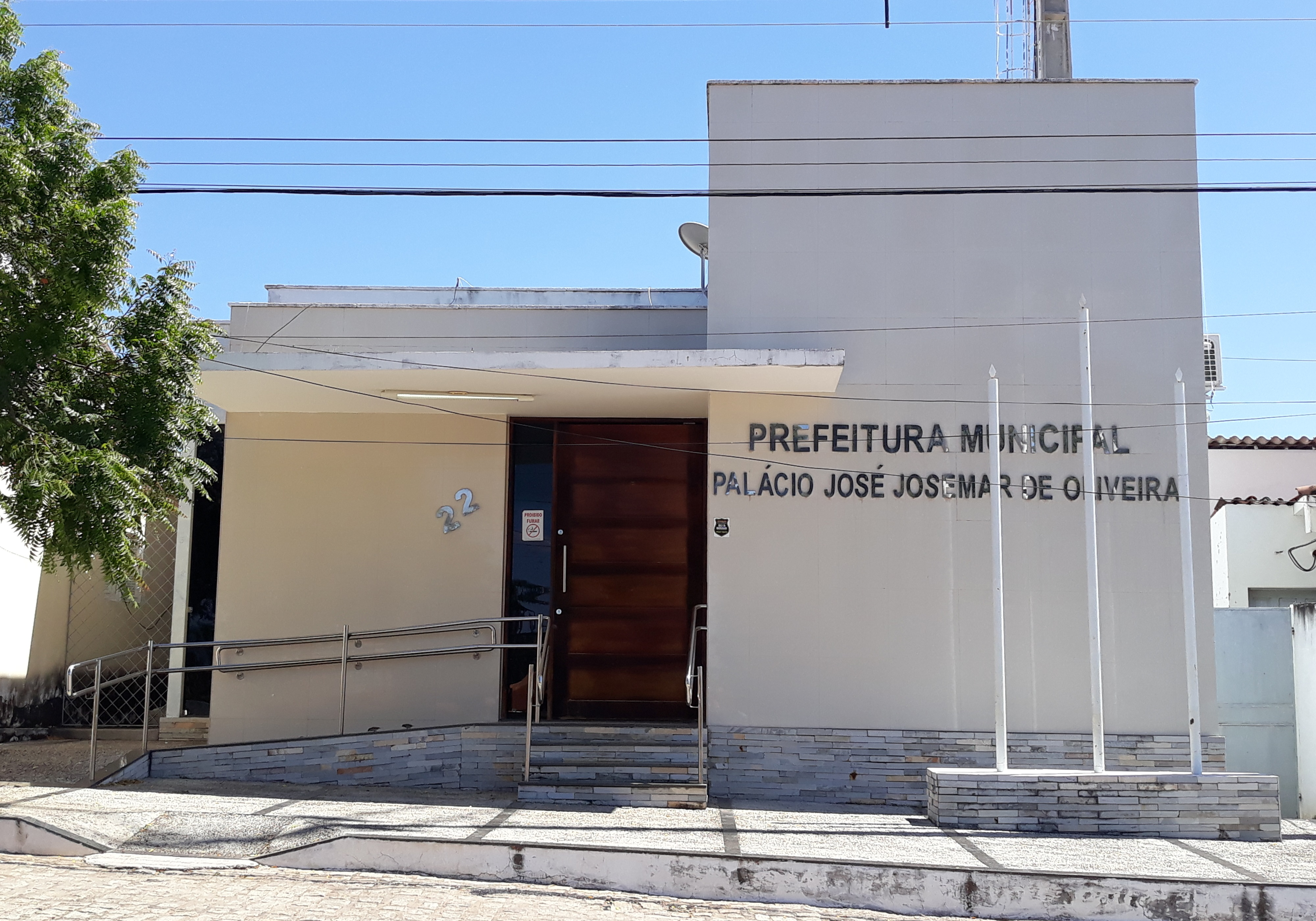 Palácio José Josemar de Oliveira, que abriga a prefeitura (sede do executivo) de José da Penha, Rio Grande do Norte (Brasil).